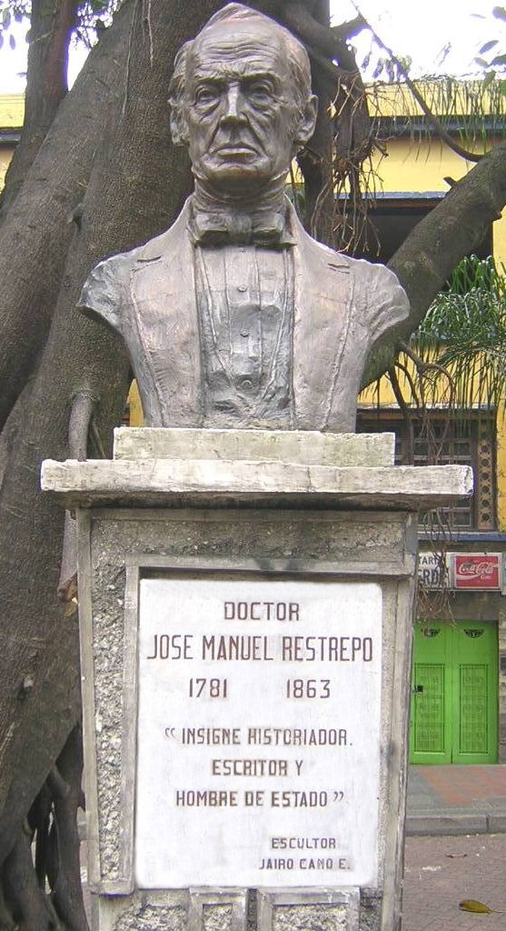 Busto de Jose Manuel Restrepo, ubicado en la Av. la Playa, Medellín, Colombia